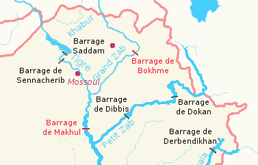 Carte des ouvrages hydrauliques irakiens réalisée avec The GIMP par X Guimard. Cropped version of Image:Barrages_irakiens focusing on northern Iraq